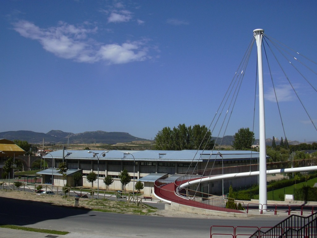 El Ferial pavillion of Haro (La Rioja, Spain).